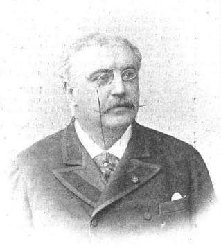 Excmo. Sr. José Álvarez de Toledo y Acuña, Conde de Xiquena, La Ilustración Española y Americana